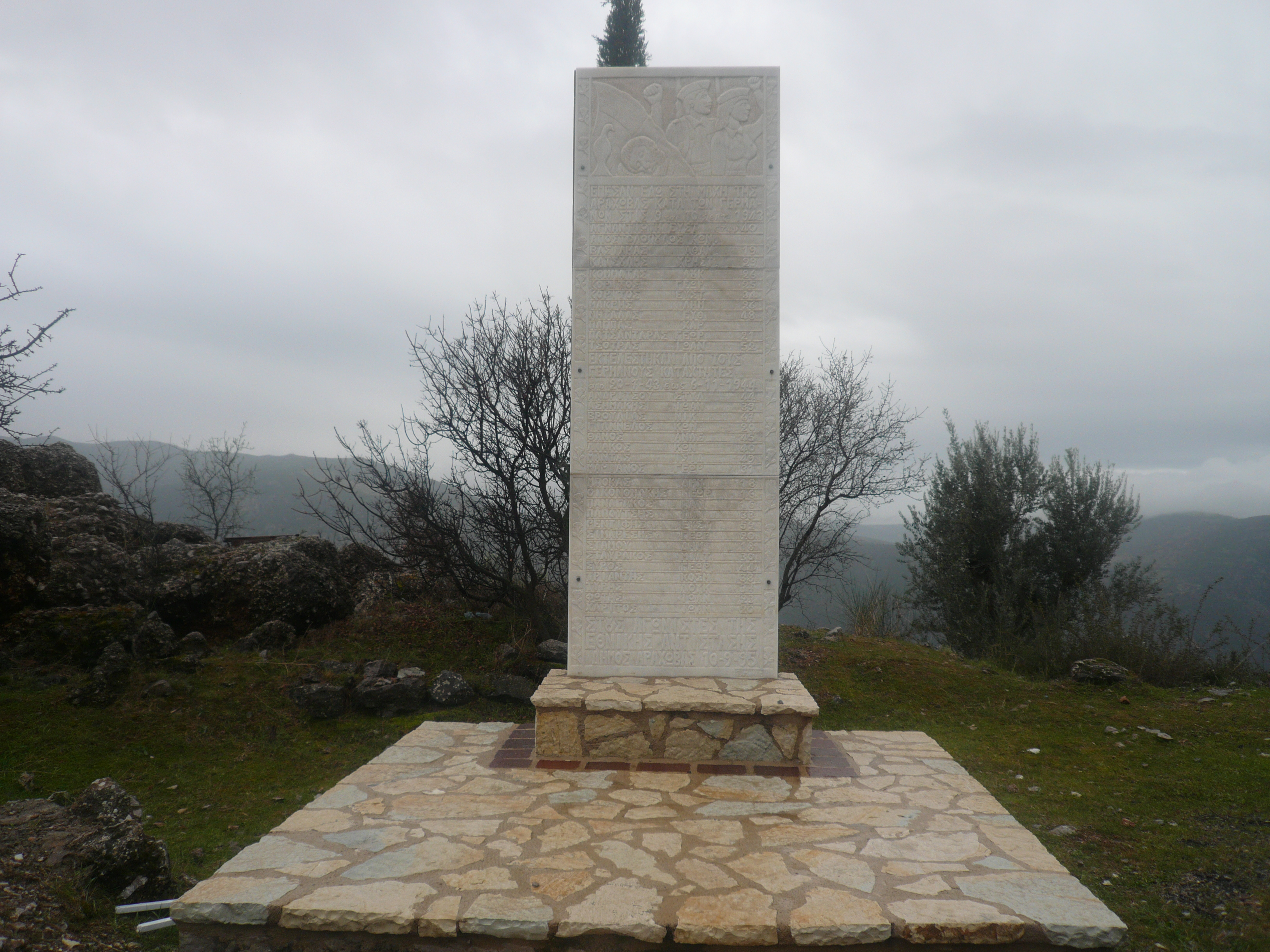 Μνημείο πεσόντων της μάχης της Αράχωβας